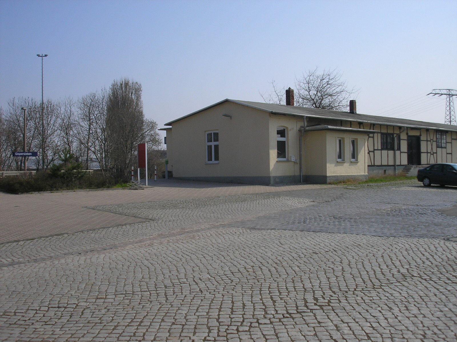 Der Bahnhof in Erfurt-Gispersleben (Thüringen).